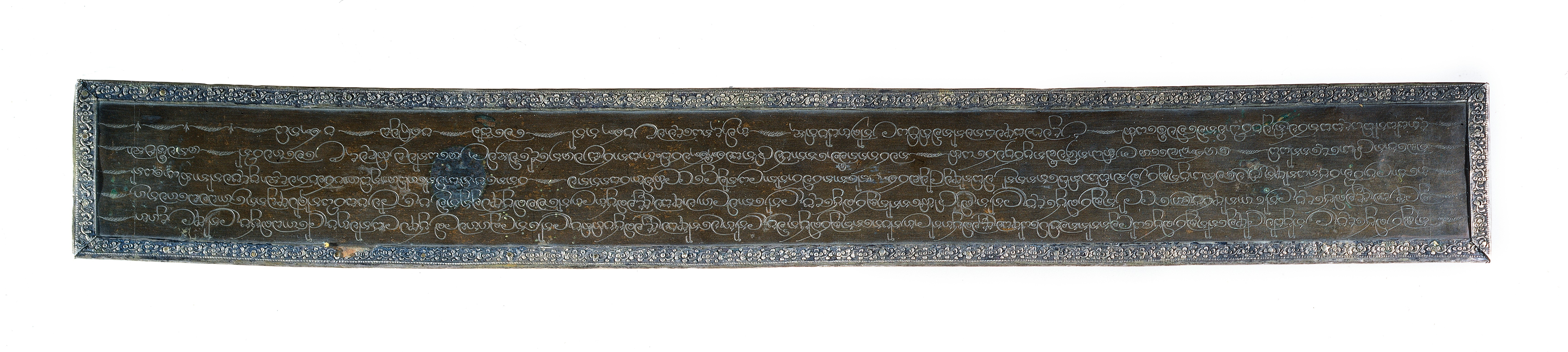 Rajadhirajasimha. Asian Collection